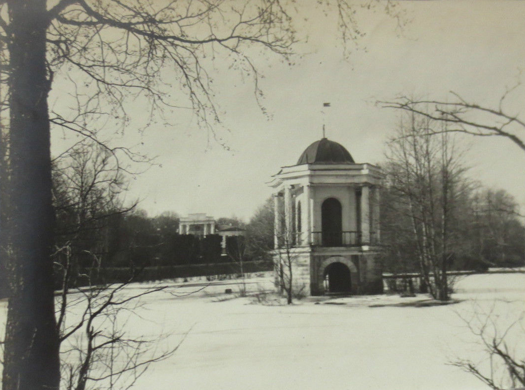 Беларуская (тарашкевіца): Вістычы (Vistyčy), сядзіба Ягмінаў (Jahmin)